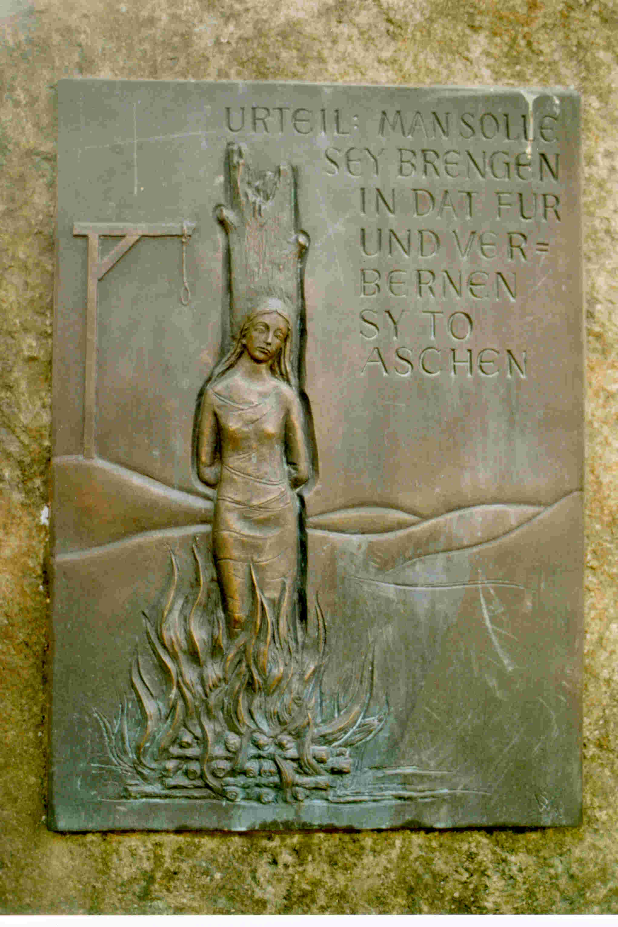 Winterberg Rathaus Gedenktafel Opfer Hexenprozesse